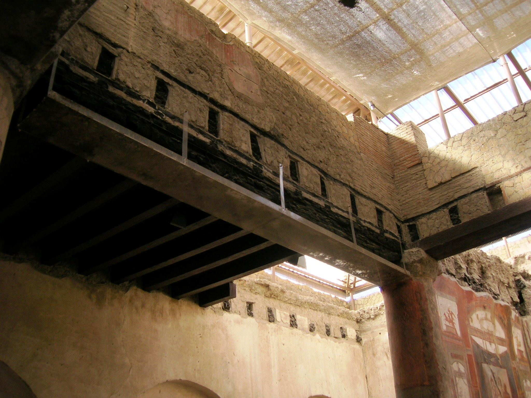 Il Collegio degli Augustali ad Ercolano